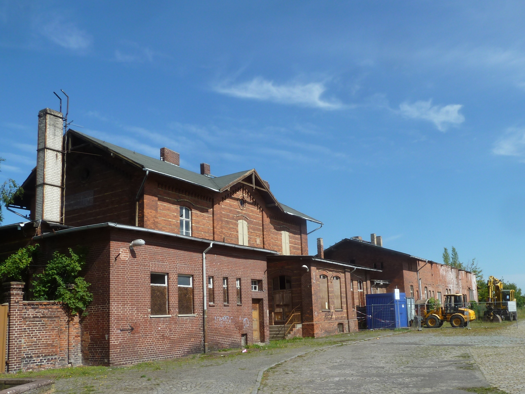 Bahnhof Tangerhütte, altes Empfangsgebäude, Straßenseite, Baudenkmal